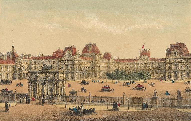 Louvre 1806-1807